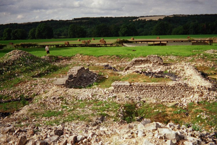 Vue sur les ruines du temple de Mazeroie situées sur le site archéologique de Nasium à St-Amand-sur-Ornain